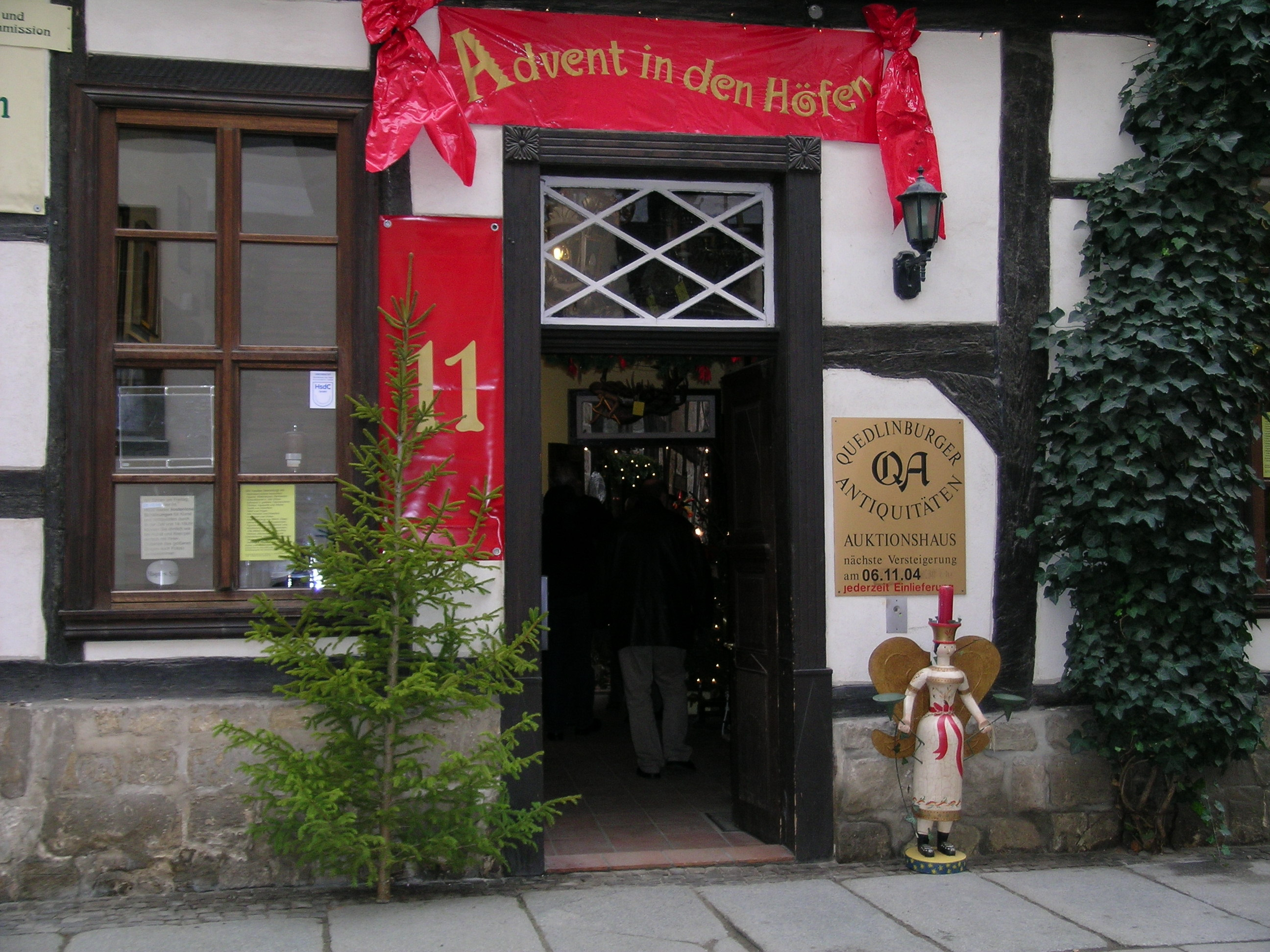 Quedlinburg - Advent in den Höfen 2004. Das Haus des Quedlinburger Auktionshauses in der Blasiistraße